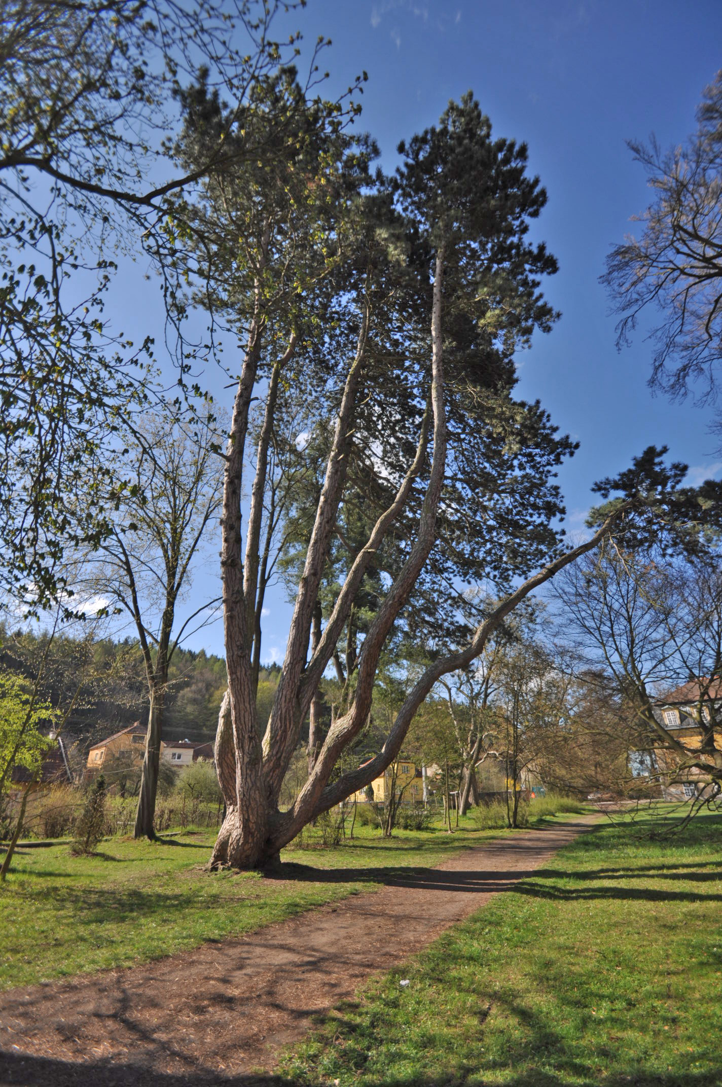 borovice černá rakouská. zámecký park Velké Opatovice, památný strom.